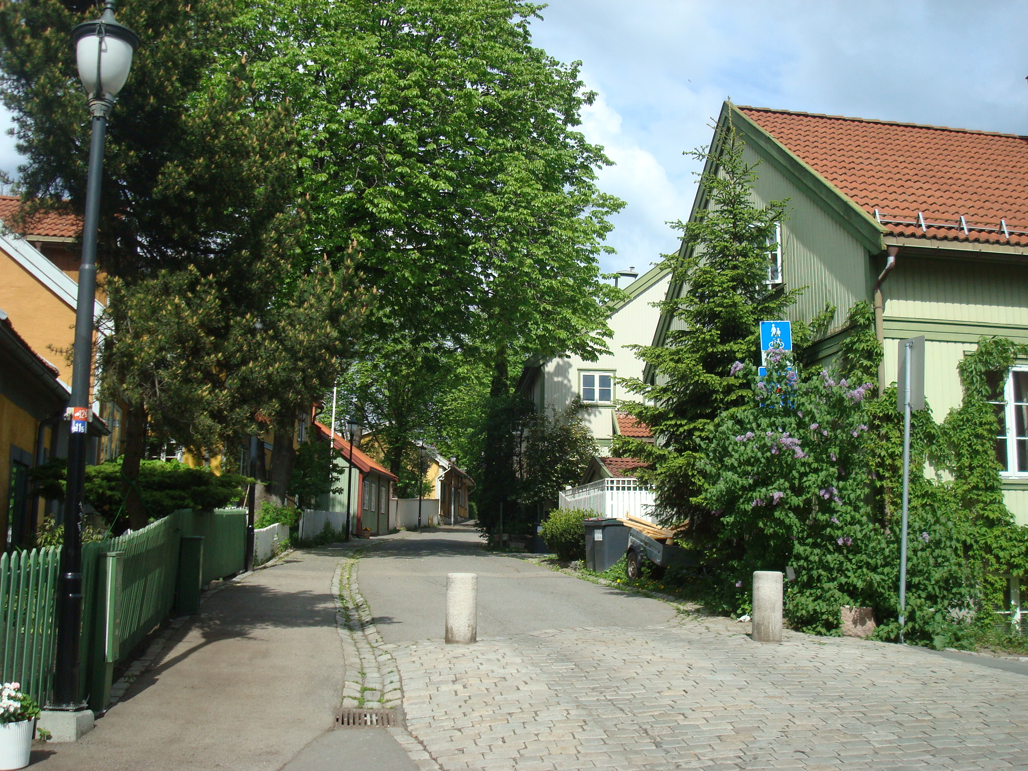 Maridalsveien i Oslo, sett fra krysset Claus Riis' gate.